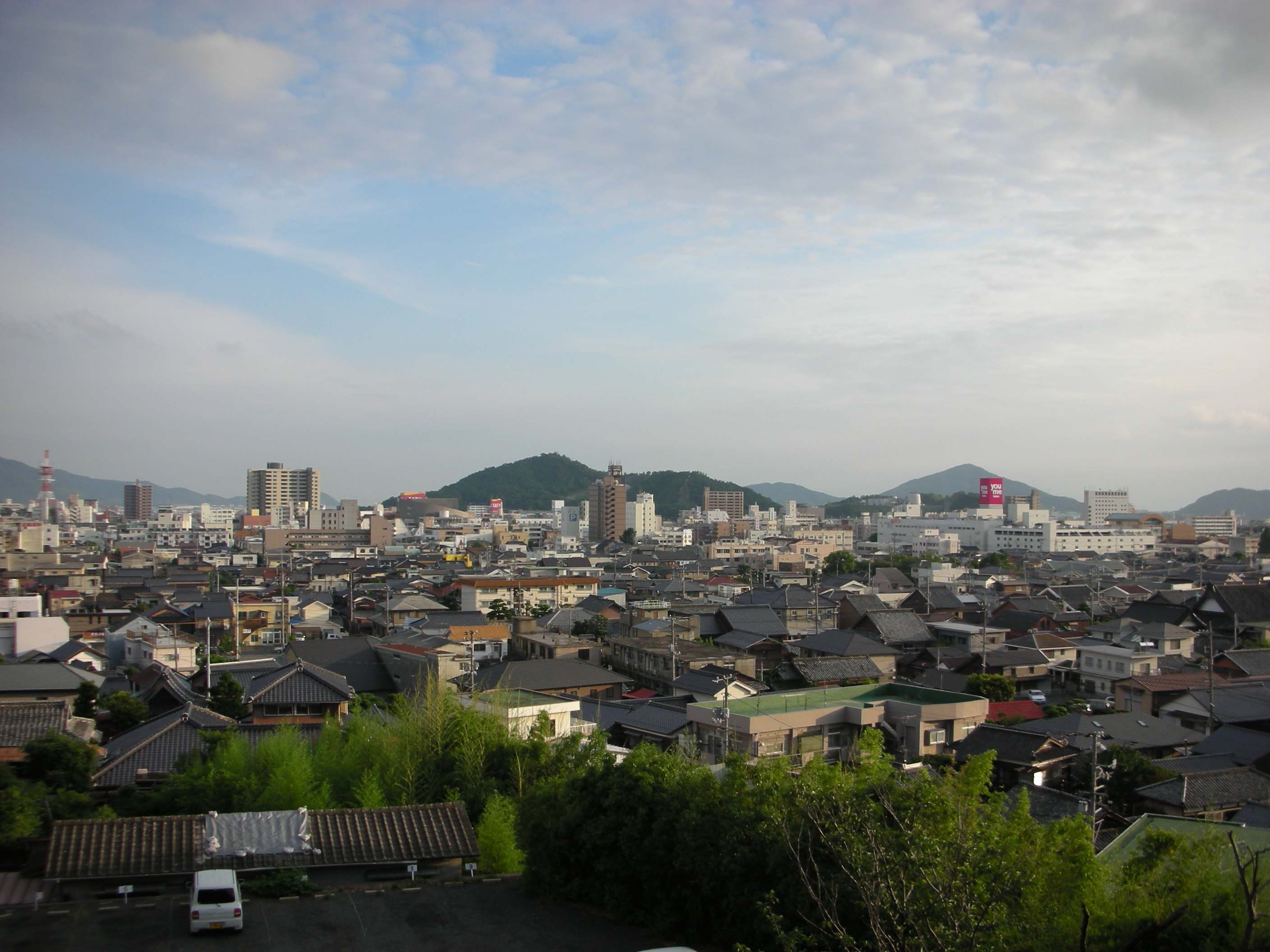 2006/7/6におんさかが撮影。防府天満宮･春風楼から防府市街地を見下ろす。Category:防府市の画像